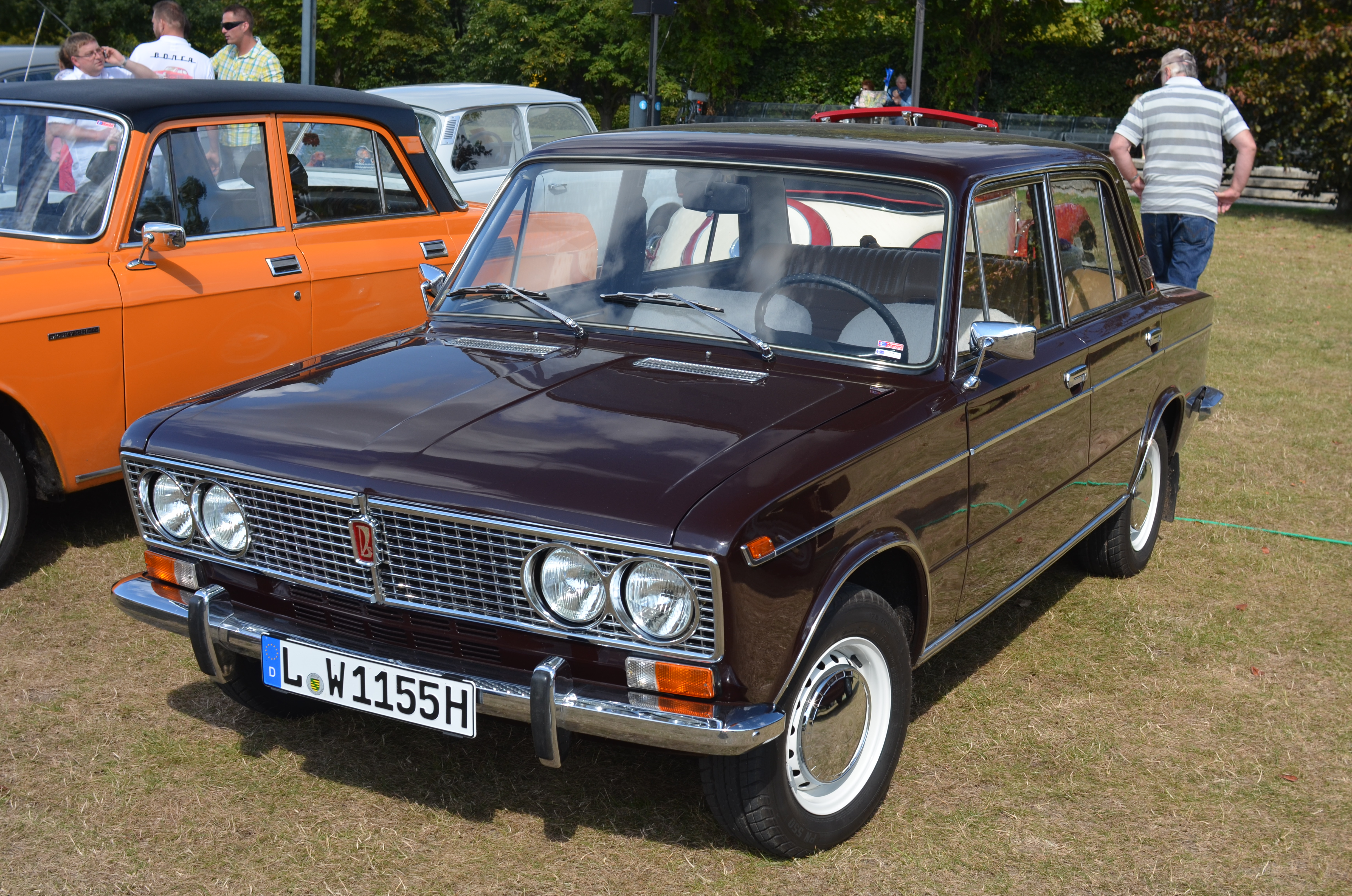 Lada 1500